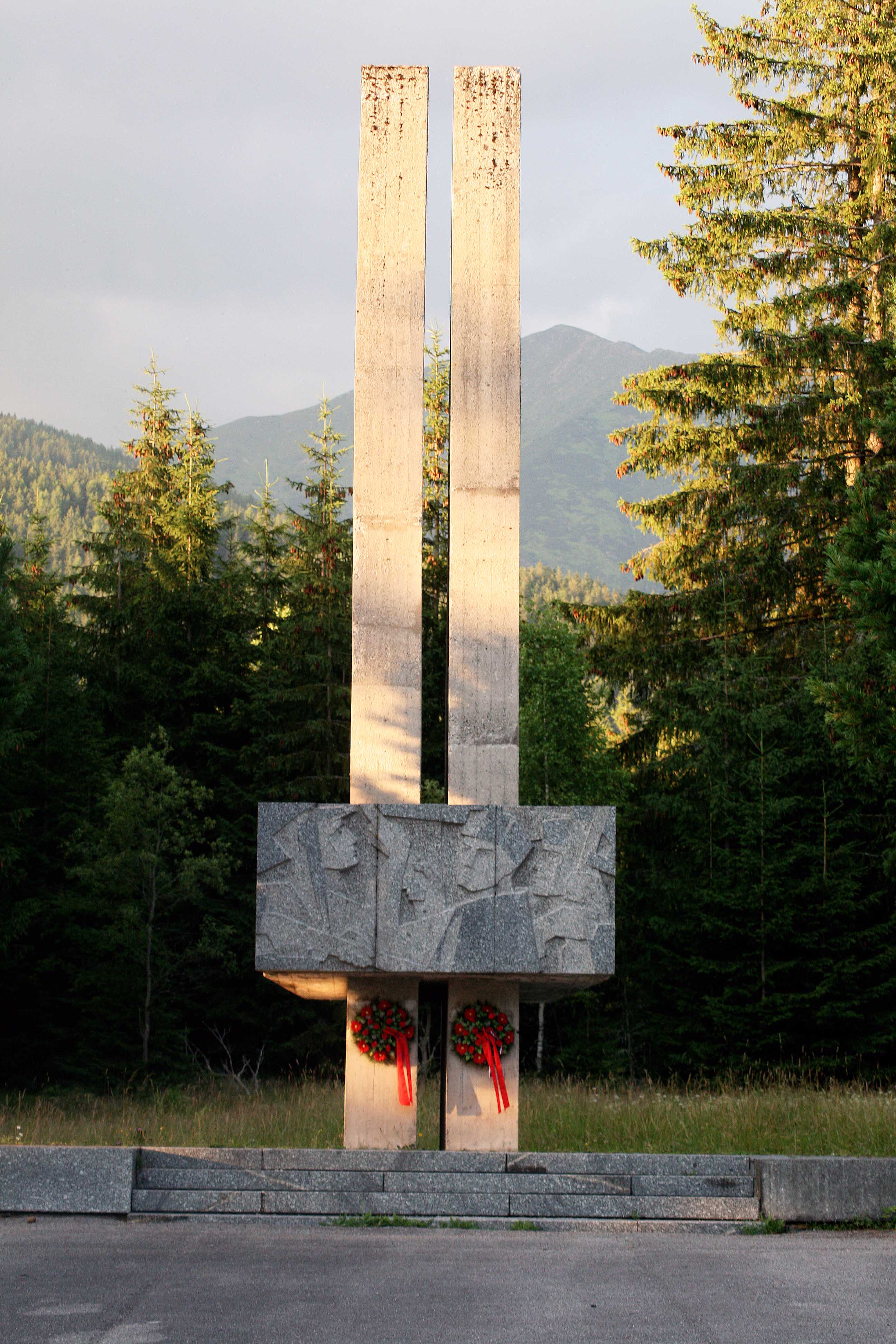 Pamätník povstaleckých bojov a oslobodzovacích bojov Sovietskej armády a I. čsl. armády v Žiarskej doline v okrese Liptovský Mikuláš; (1972)